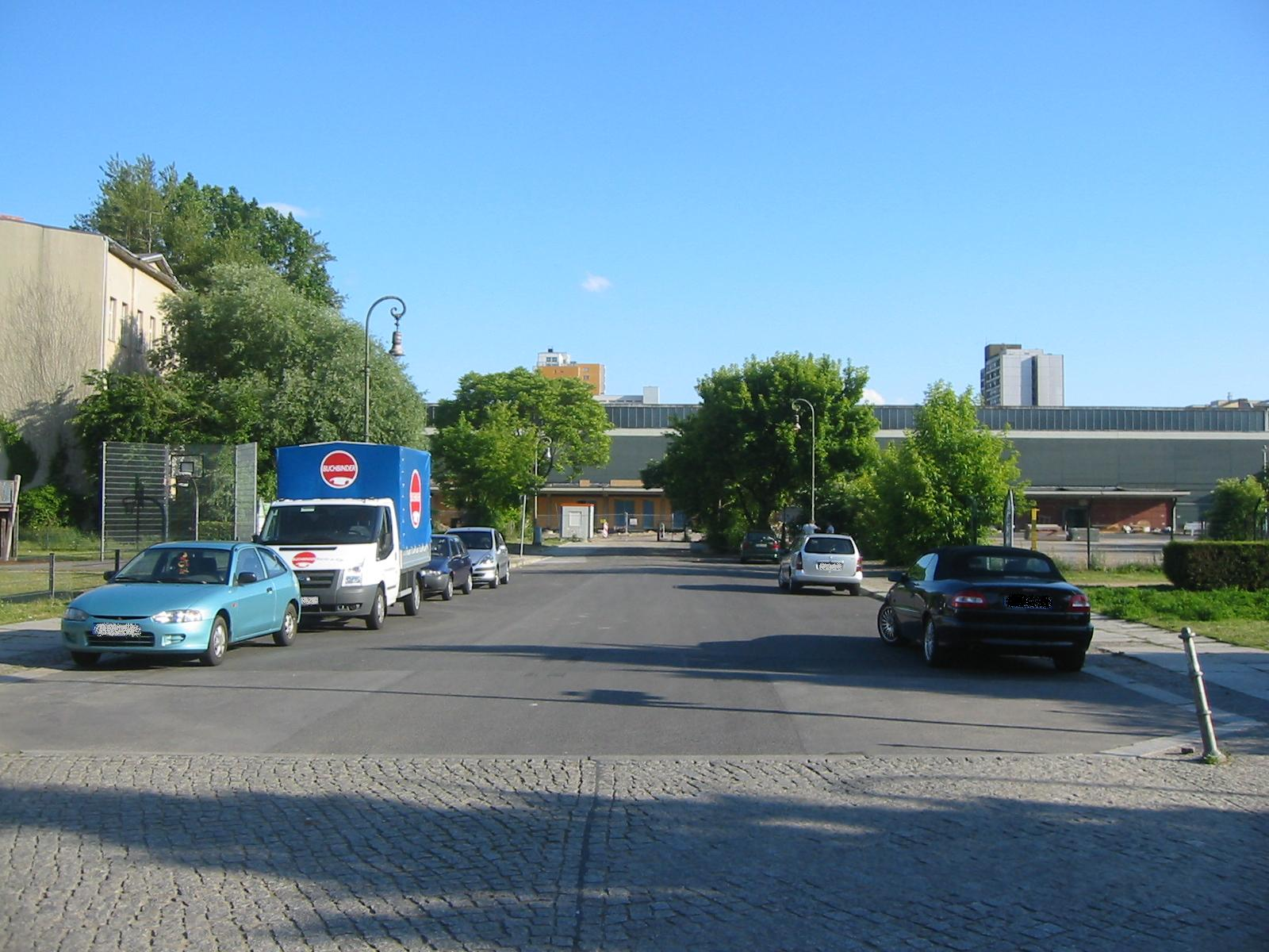 Blick auf die Enckestraße in Richtung ehemaliger Blumengroßmarkthalle in Berlin-Kreuzberg